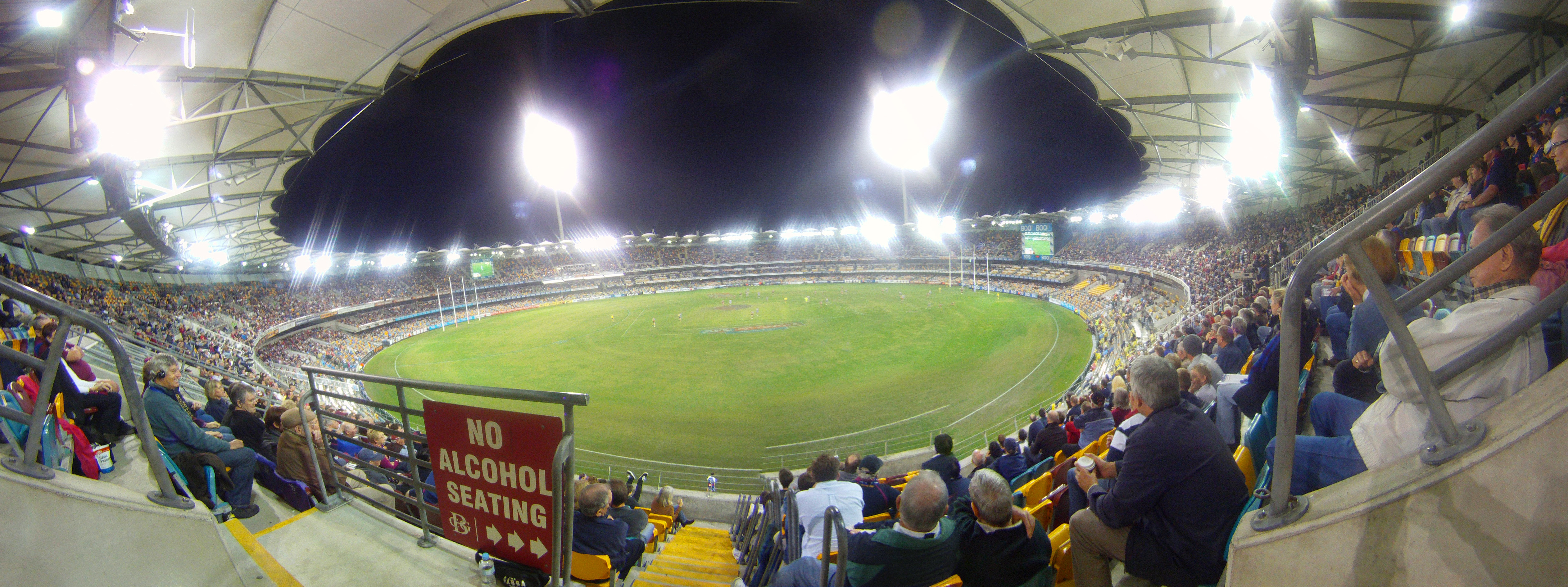 Gabba panorama